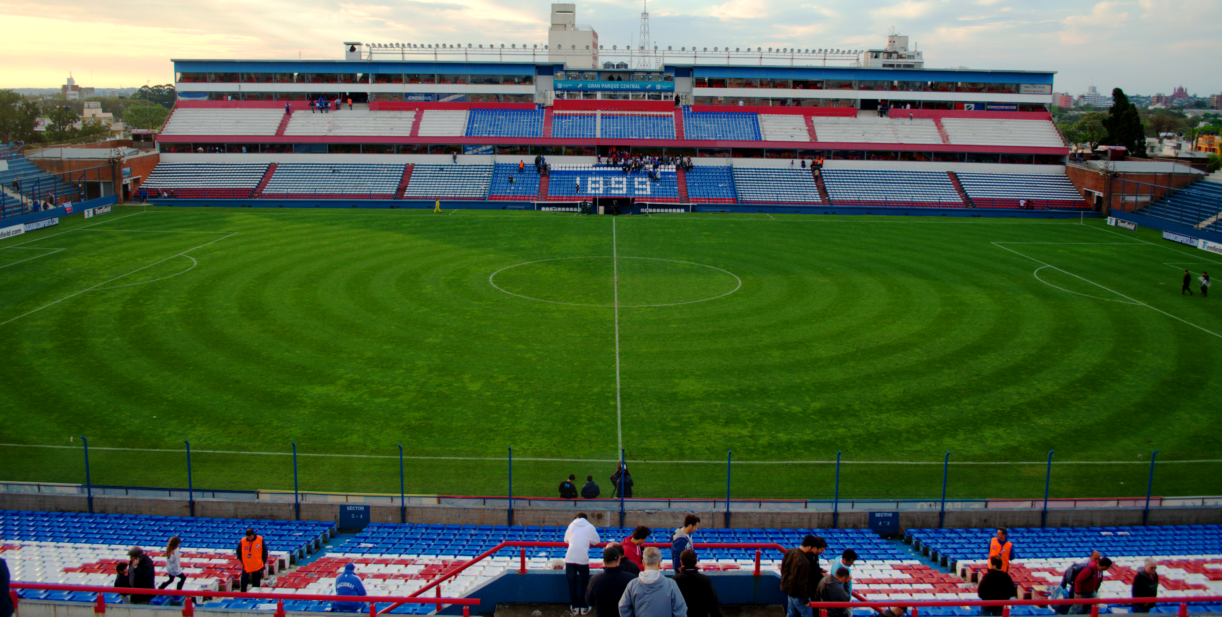 Imagen del estadio Gran Parque Central.